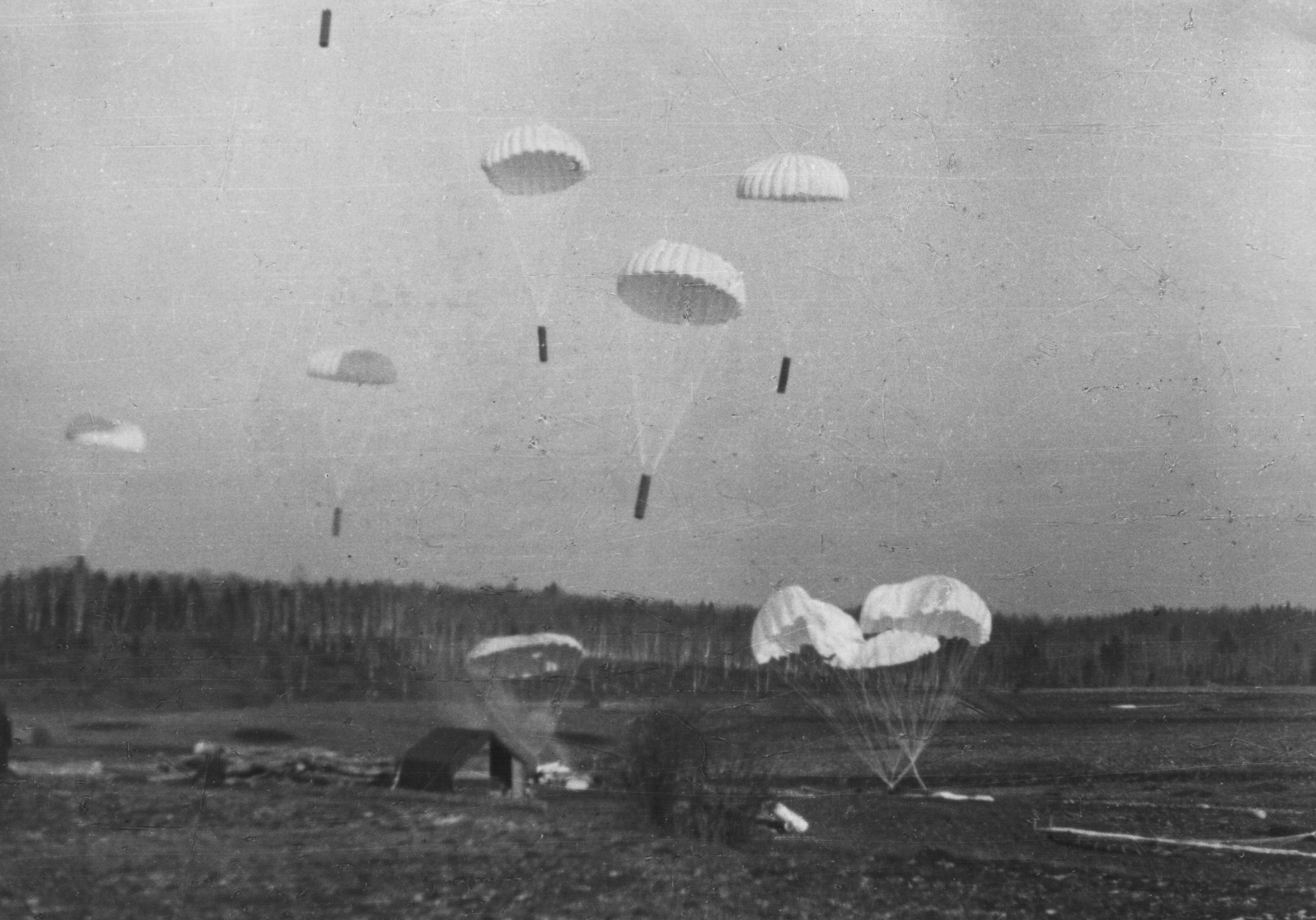 Srpskohrvatski / српскохрватски: Saveznički avioni bacaju vojni materijal u Sloveniji 1944.